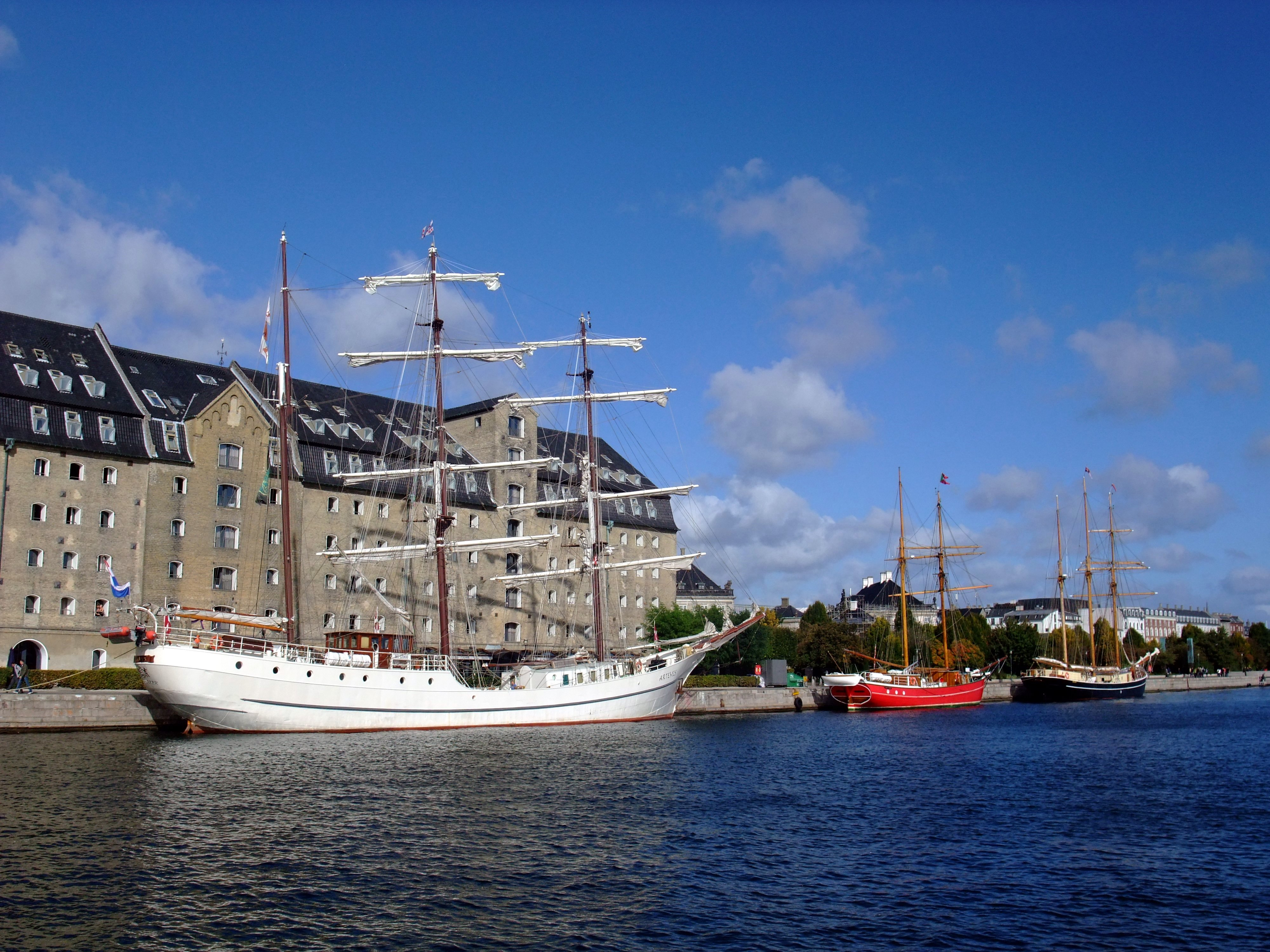 Det dobbelte Pakhus, now Copenhagen Admiral Hotel, in Copenhagen, Denmark